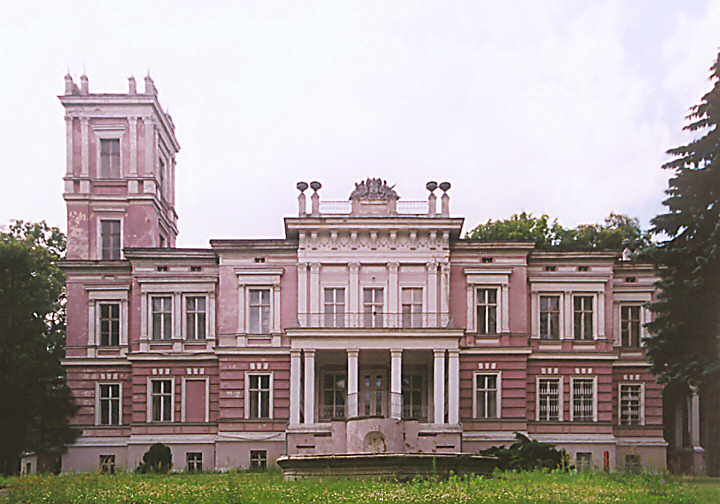 Pałac w Biedrusku Stanisław Nowak, Poznań, Poland